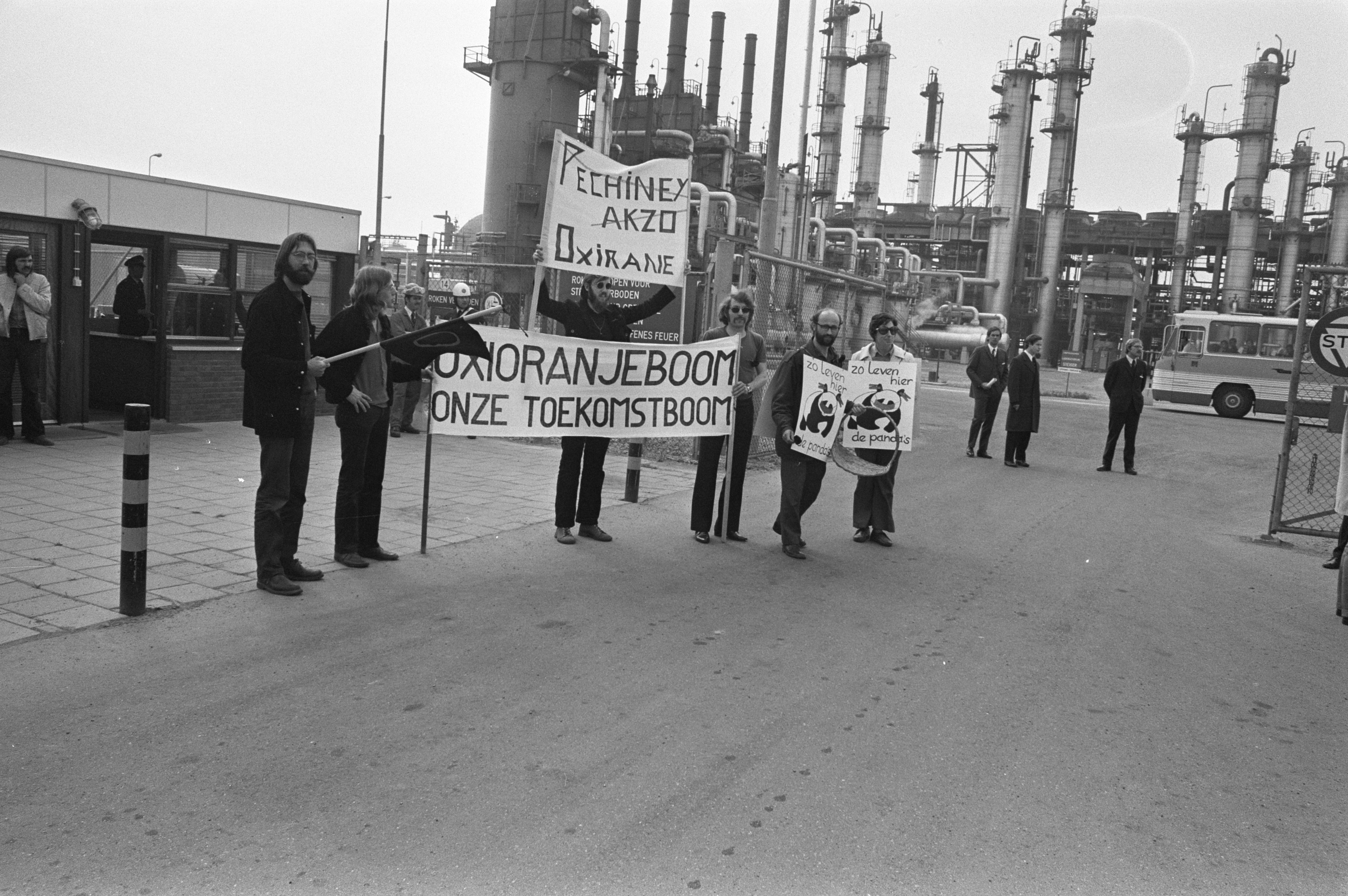 Collectie / Archief : Fotocollectie Anefo Reportage / Serie : Opening van chemiefabriek Oxirane Chemie Nederland te Rotterdam Beschrijving : Leden van het Centraal Actiecomite Rijnmond demonstreren tegen de opening, voor de poort van Oxirane Chemie, met "Oxioranjeboom onze toekomstboom" Datum : 8 mei 1972 Locatie : Rotterdam, Zuid-Holland Trefwoorden : betogingen, chemische industrie, fabrieken, milieubeweging, spandoeken Persoonsnaam : Thomassen, Wim Instellingsnaam : Oxirane-Chemie Nederland nv Fotograaf : Fotograaf Onbekend / Anefo Auteursrechthebbende : Nationaal Archief Materiaalsoort : Negatief (zwart/wit) Nummer archiefinventaris : bekijk toegang 2.24.01.05 Bestanddeelnummer : 925-5871